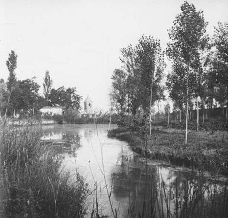 Bassa del molí d'Altarriba i campanar al fons. Frederic Bordas i Altarriba (ca. 1890)